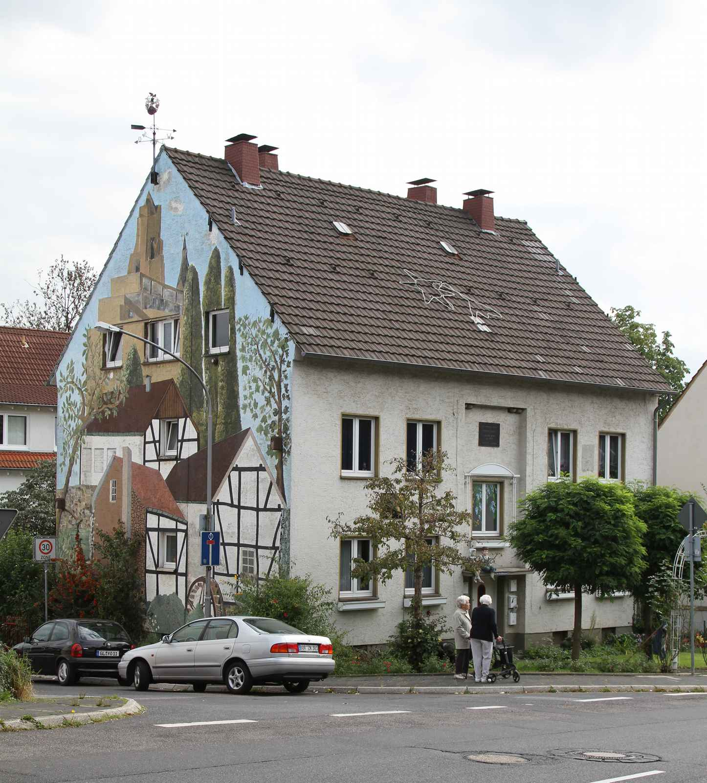 Wohnhaus des Puppenspielers Rudolf Fischer in Bensberg